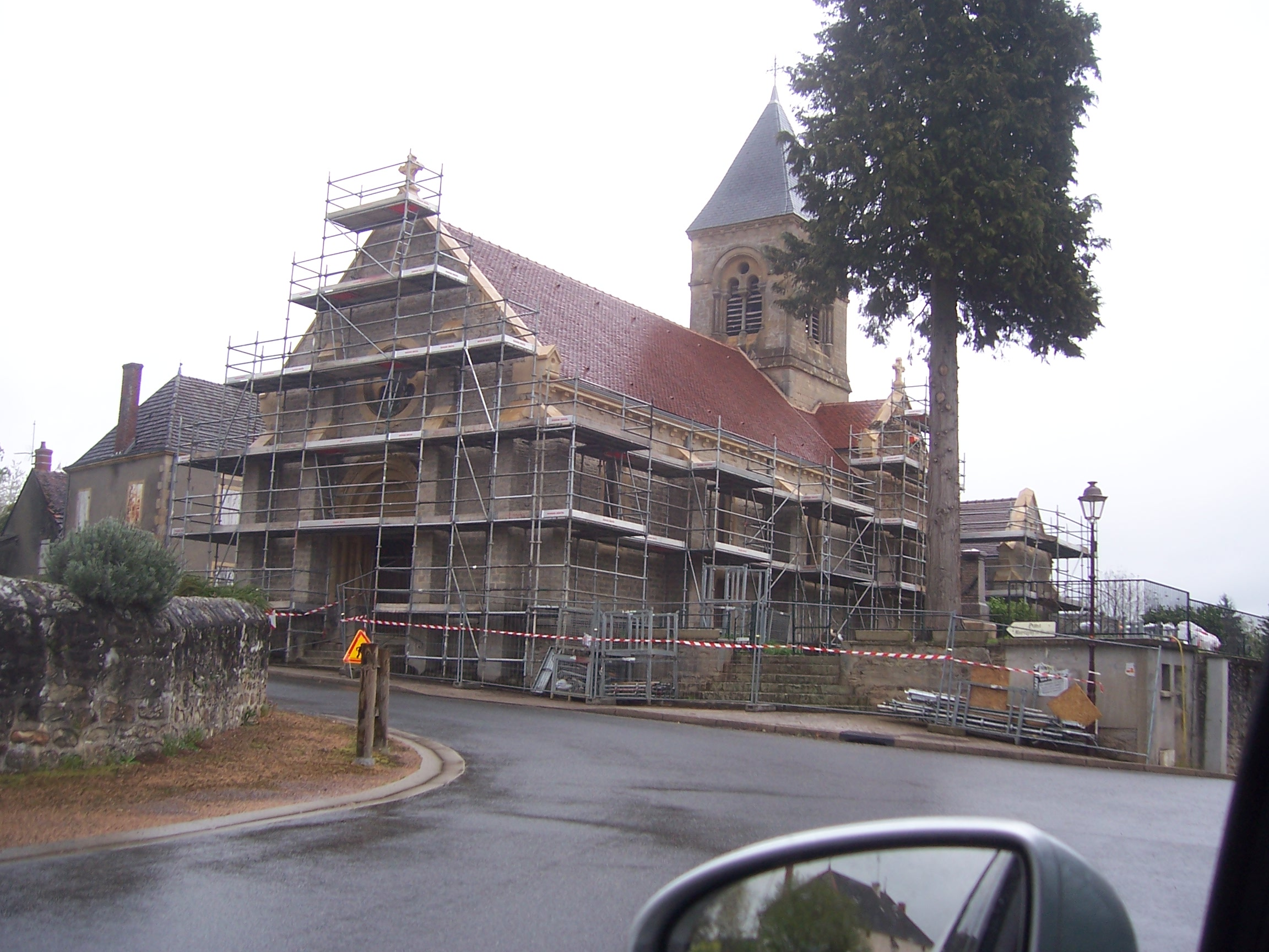 Eglise de Saint-Bonnet-de-Vieille-Vigne